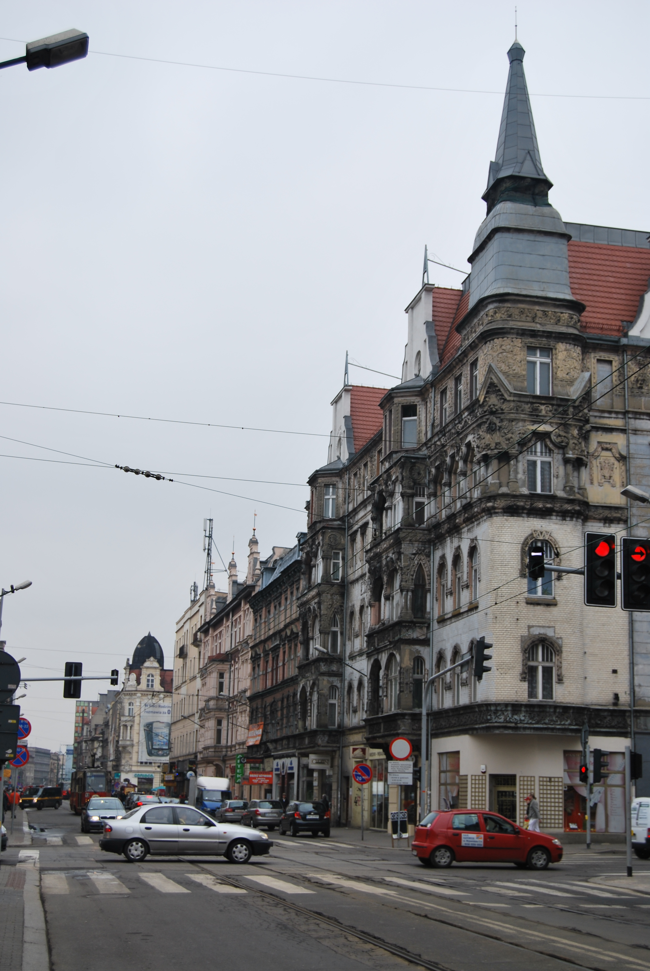 Kamienica mieszczańska przy ul. 3 Maja 40 w Katowicach w stylu secesyjnym z 1906 r. bud. przez Pawła Franzidcha.